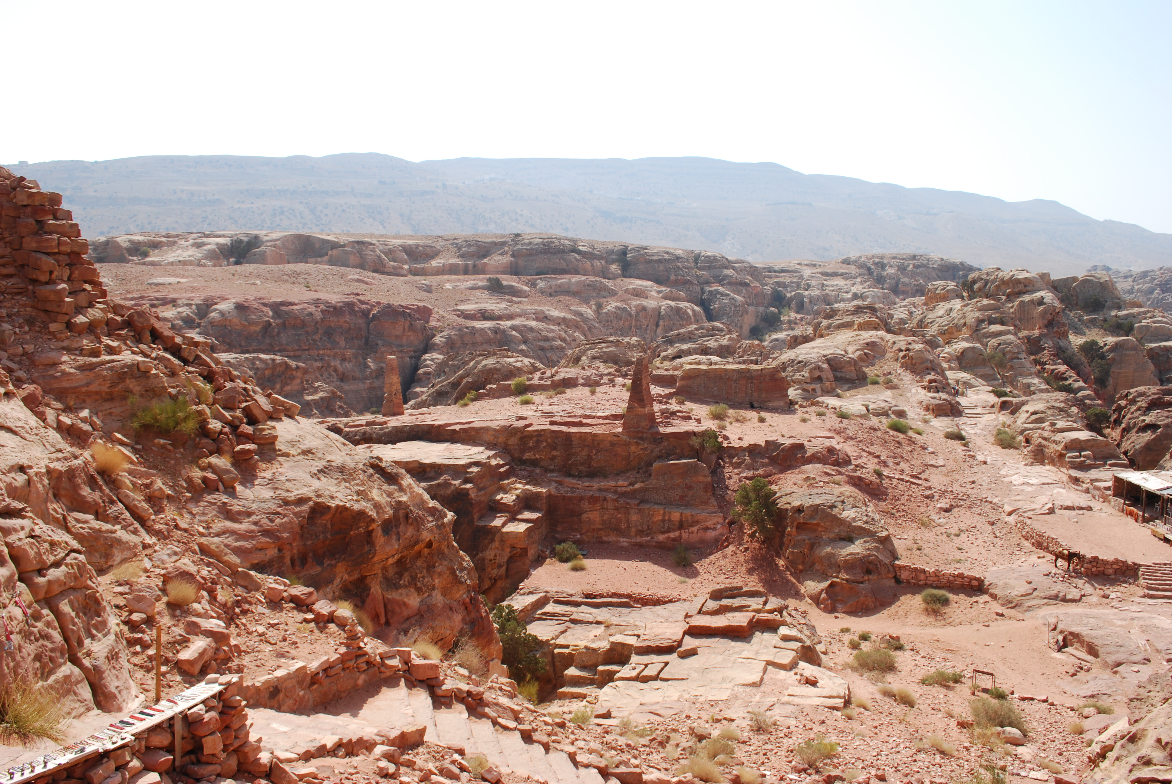 Le Haut Lieu du Sacrifice, à Pétra.